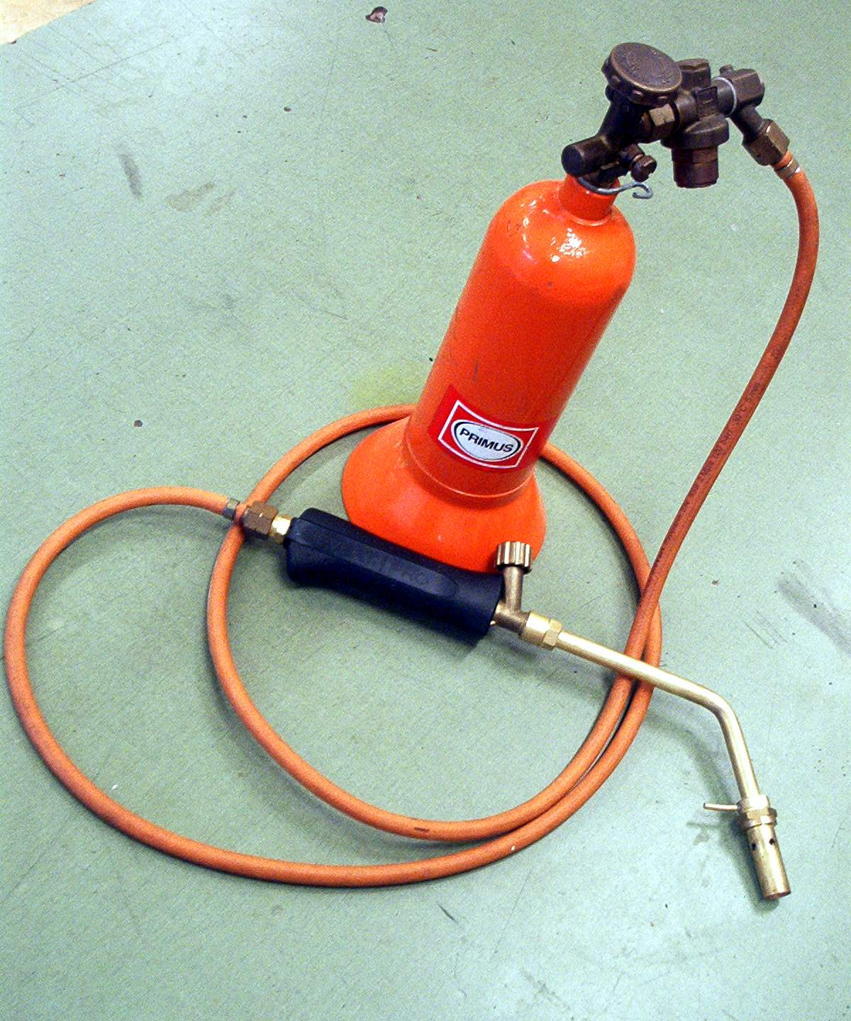 foto van een karweibrander